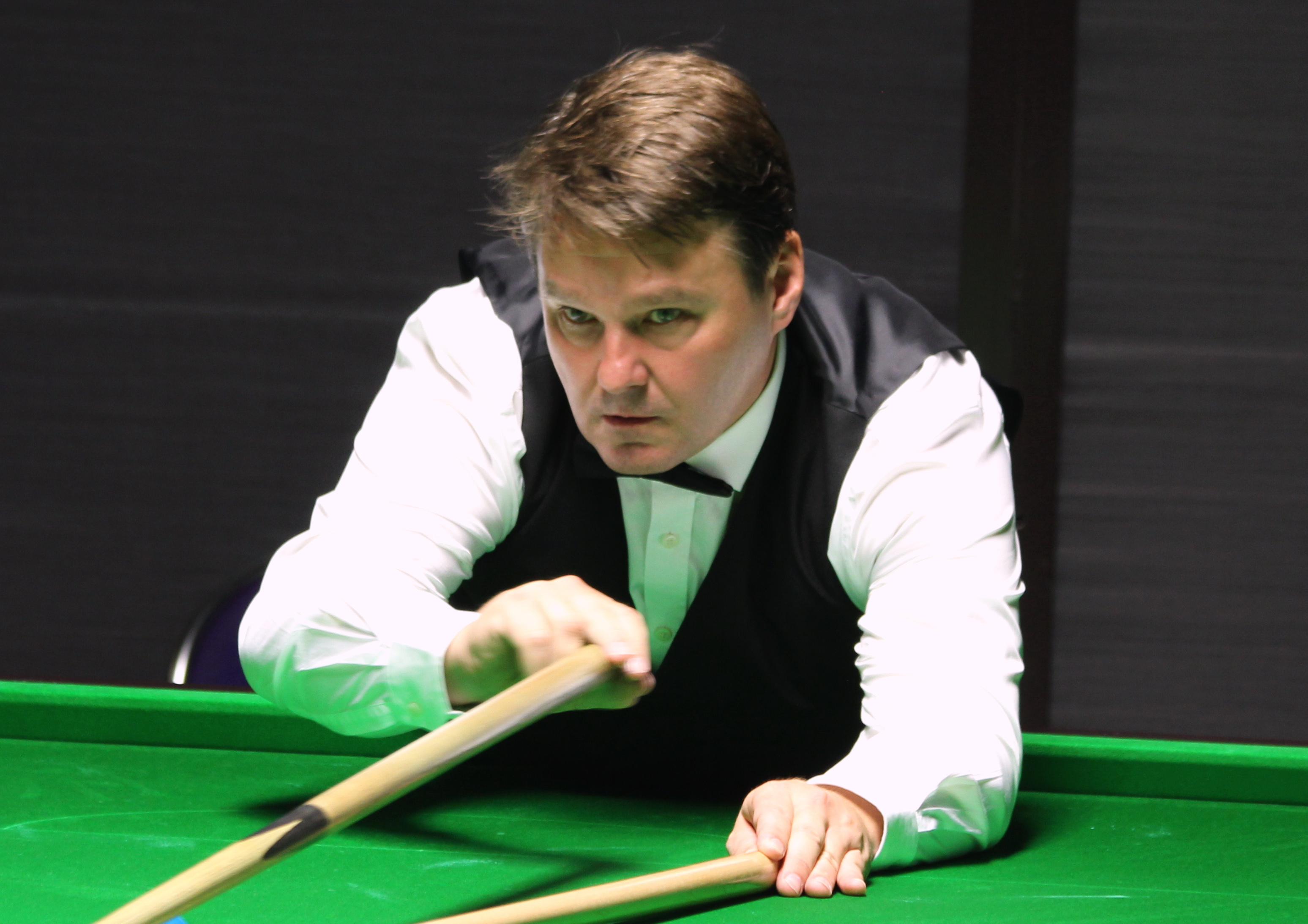 Jason Weston beim Paul Hunter Classic 2016